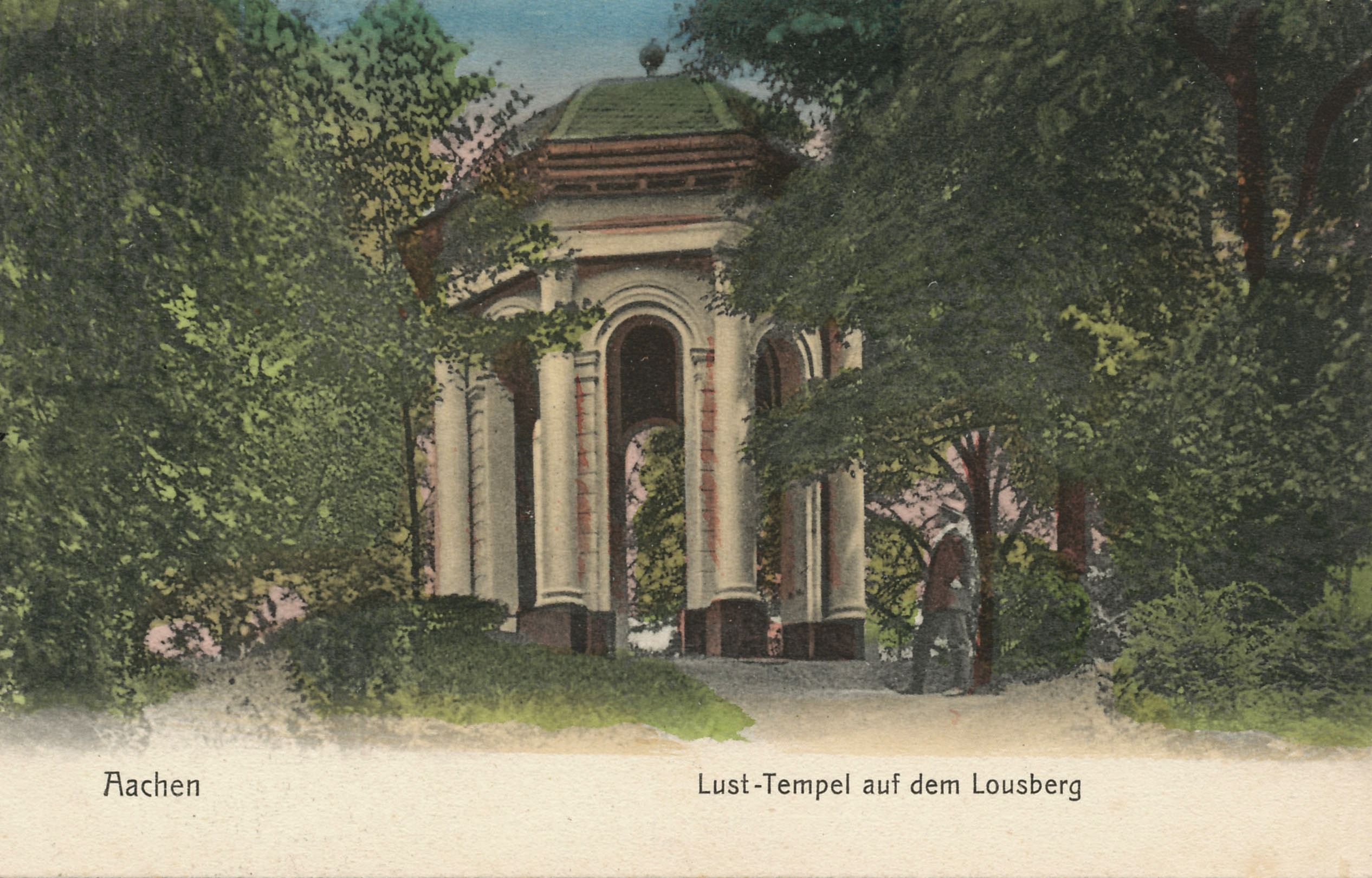 Der (heute nicht mehr vorhandene) Lust-Tempel (Monopteros) auf dem Lousberg in Aachen